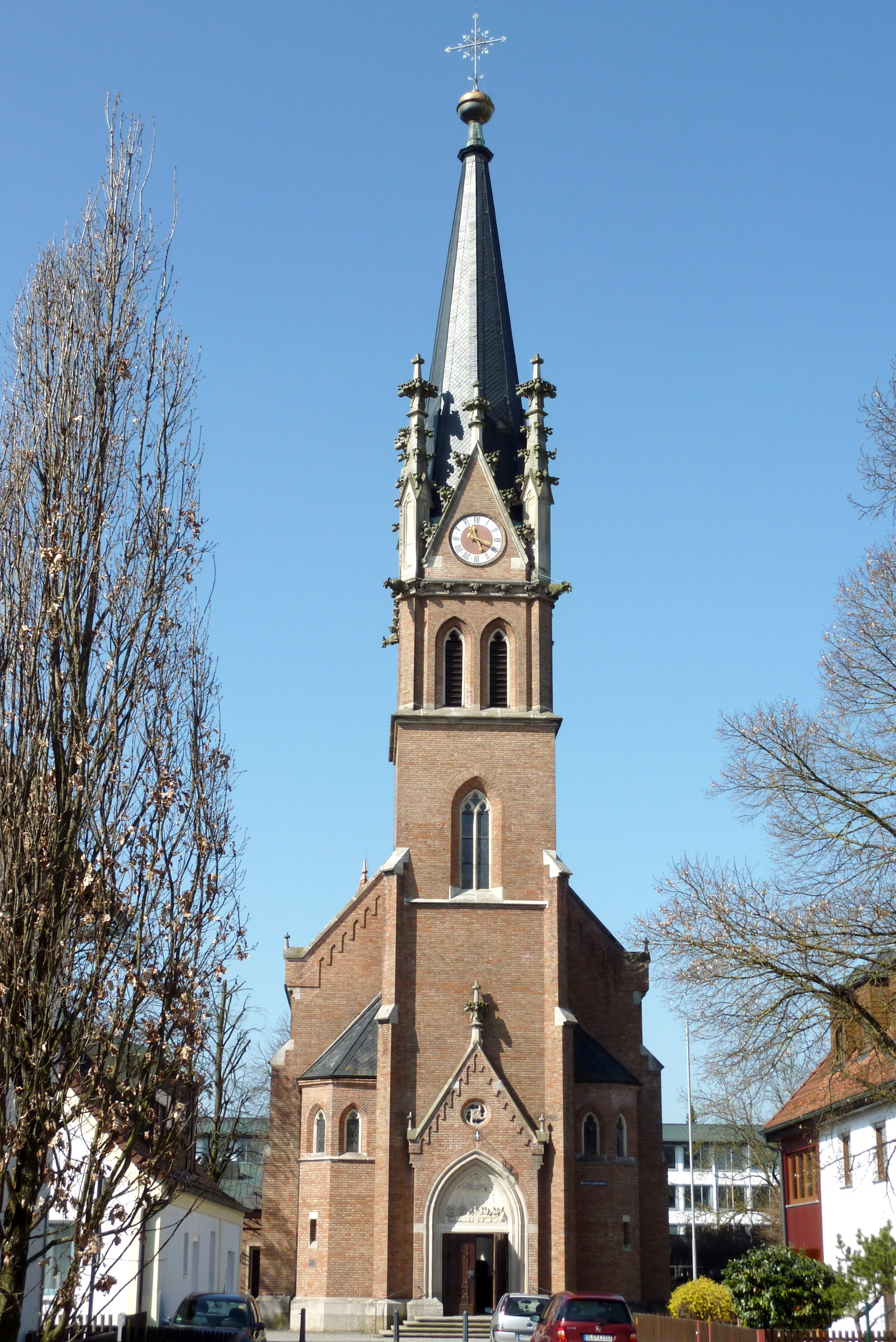 Evangelische Katharinenkirche in Dillingen an der Donau (Bayern)